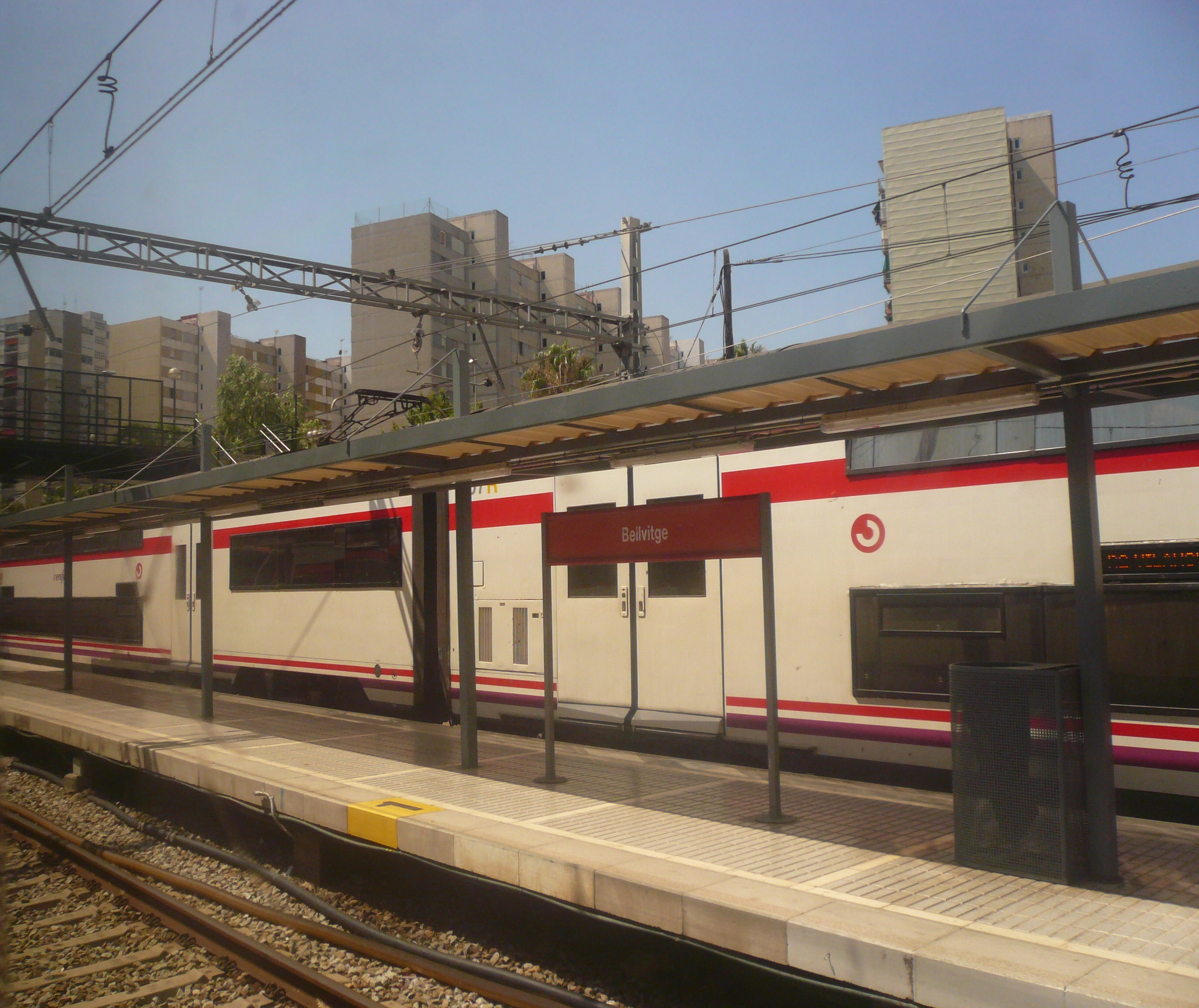 Estació de rodalies de Bellvitge, fotografiada des d'un tren en direcció Barcelona.